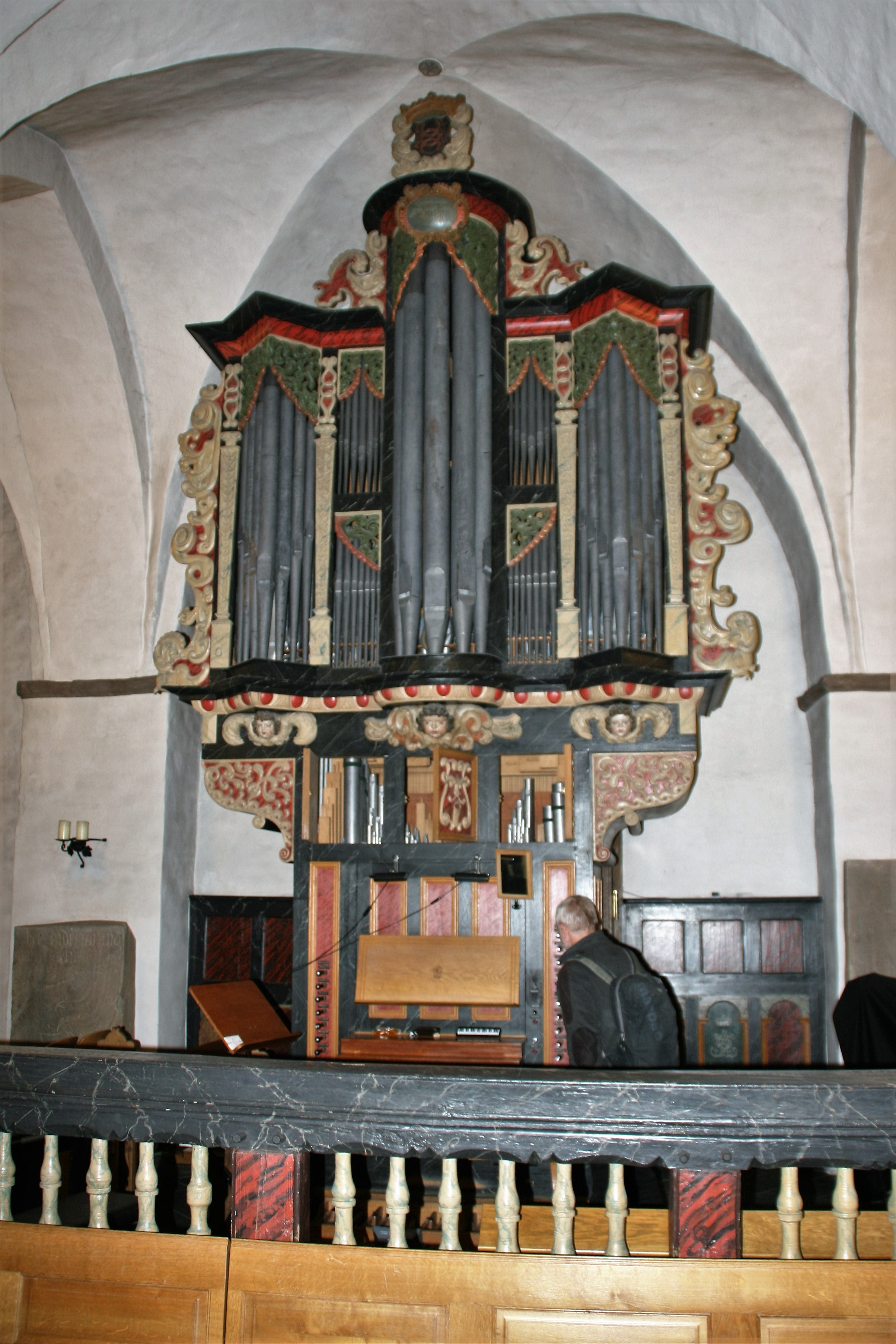 Orgel in der Apostelkirche in Herscheid (Märkischer Kreis).